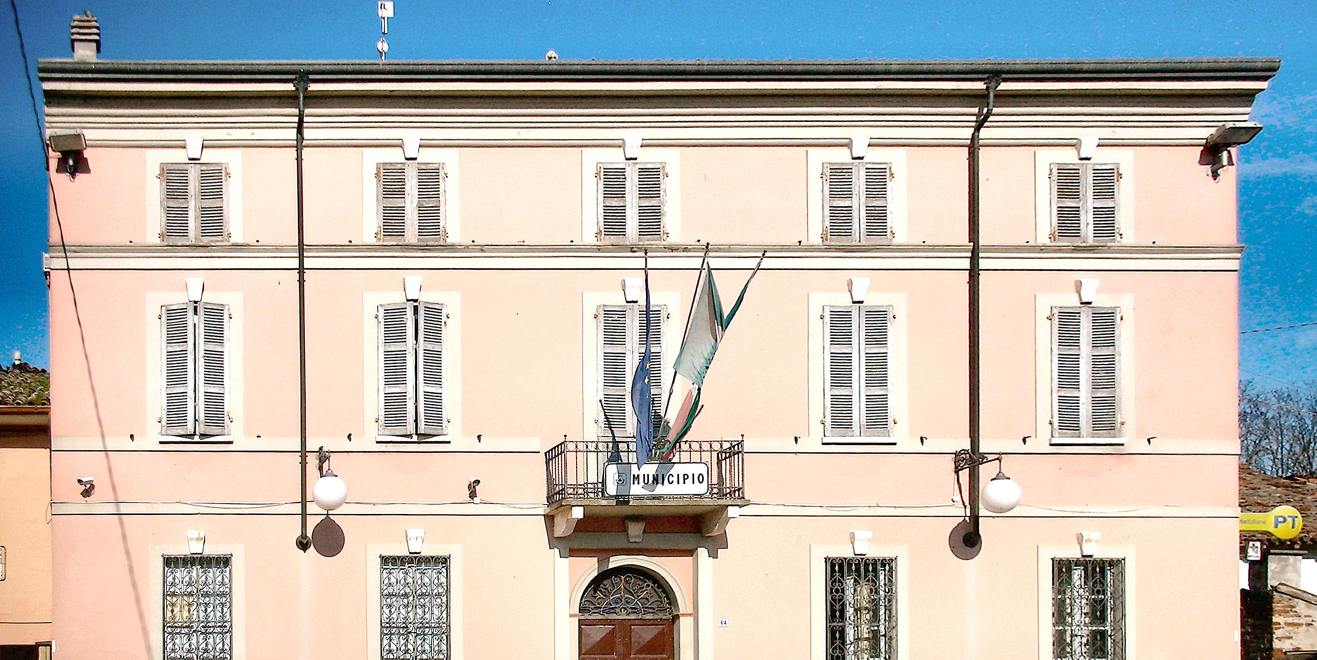 Martignana di Po municipio